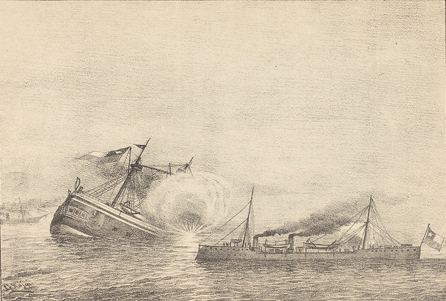 Batallas de la Guerra Civil de 1891: 23 de abril de 1891 - Combate Naval de Caldera